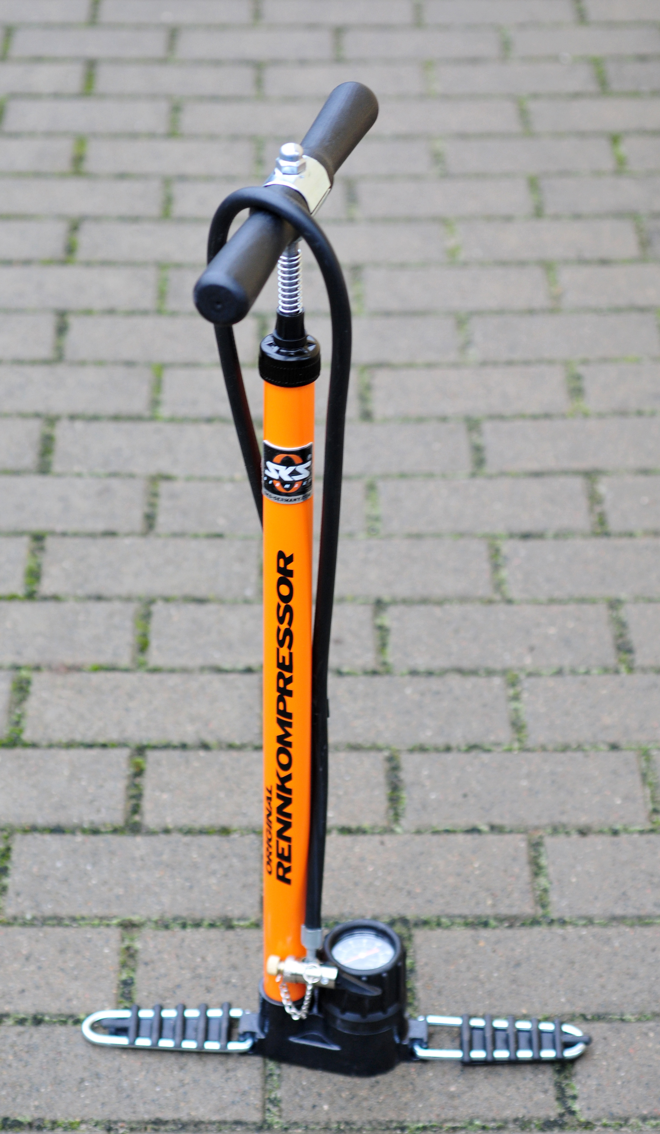 Fahrradkram